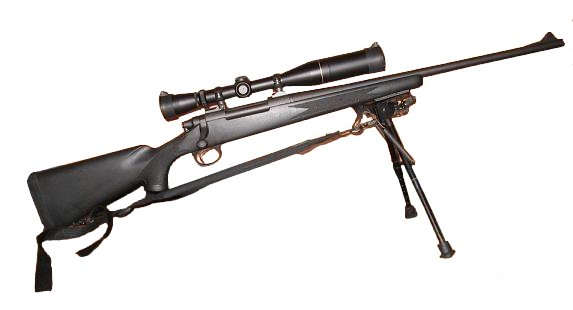 Remington Model 700 Remington Model 700 ADL, Leupold scope, Harris Bipod